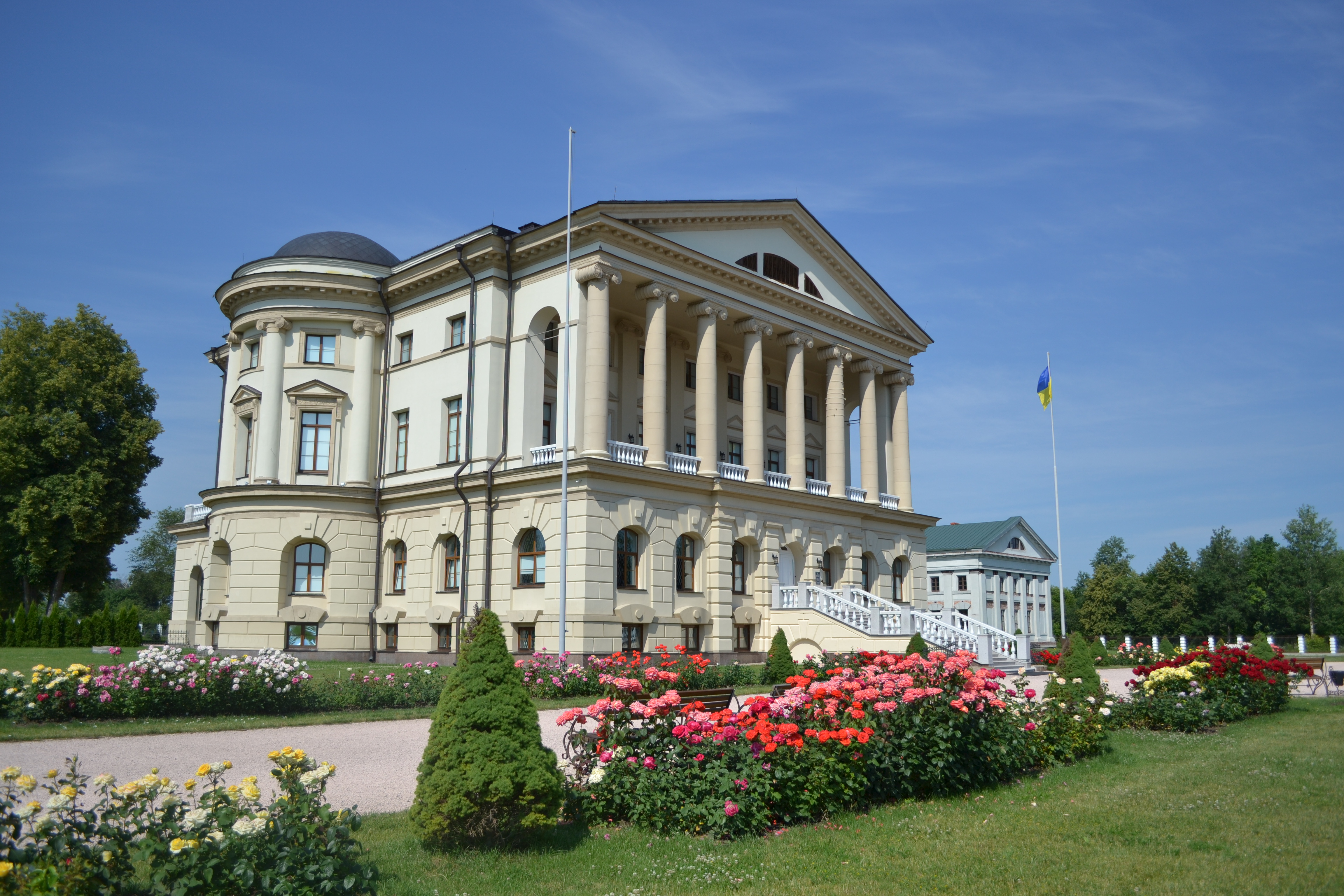 Палац К. Розумовського на фоні троянд